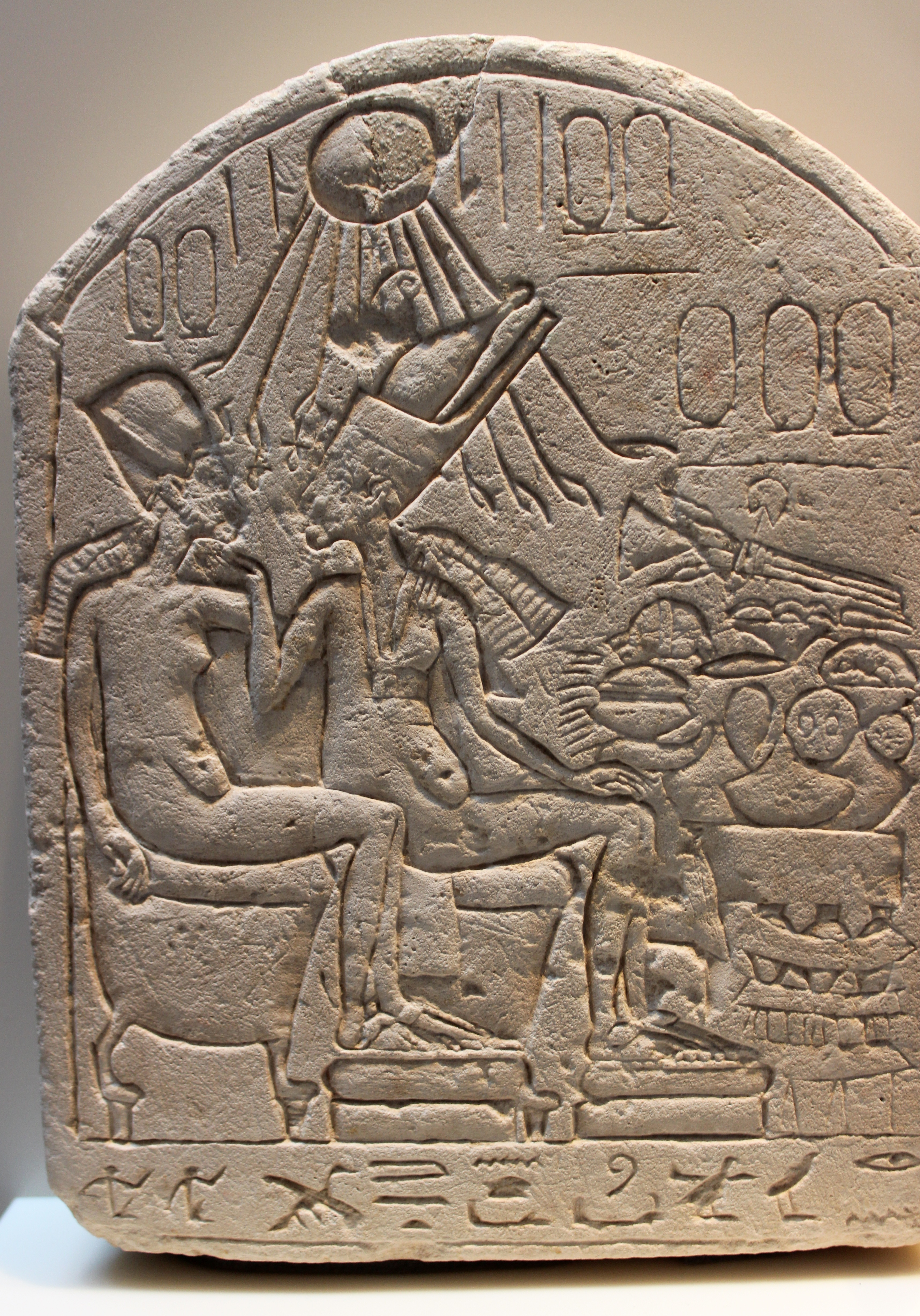 Berlín, Neues Museum. Relieve de Amarna.